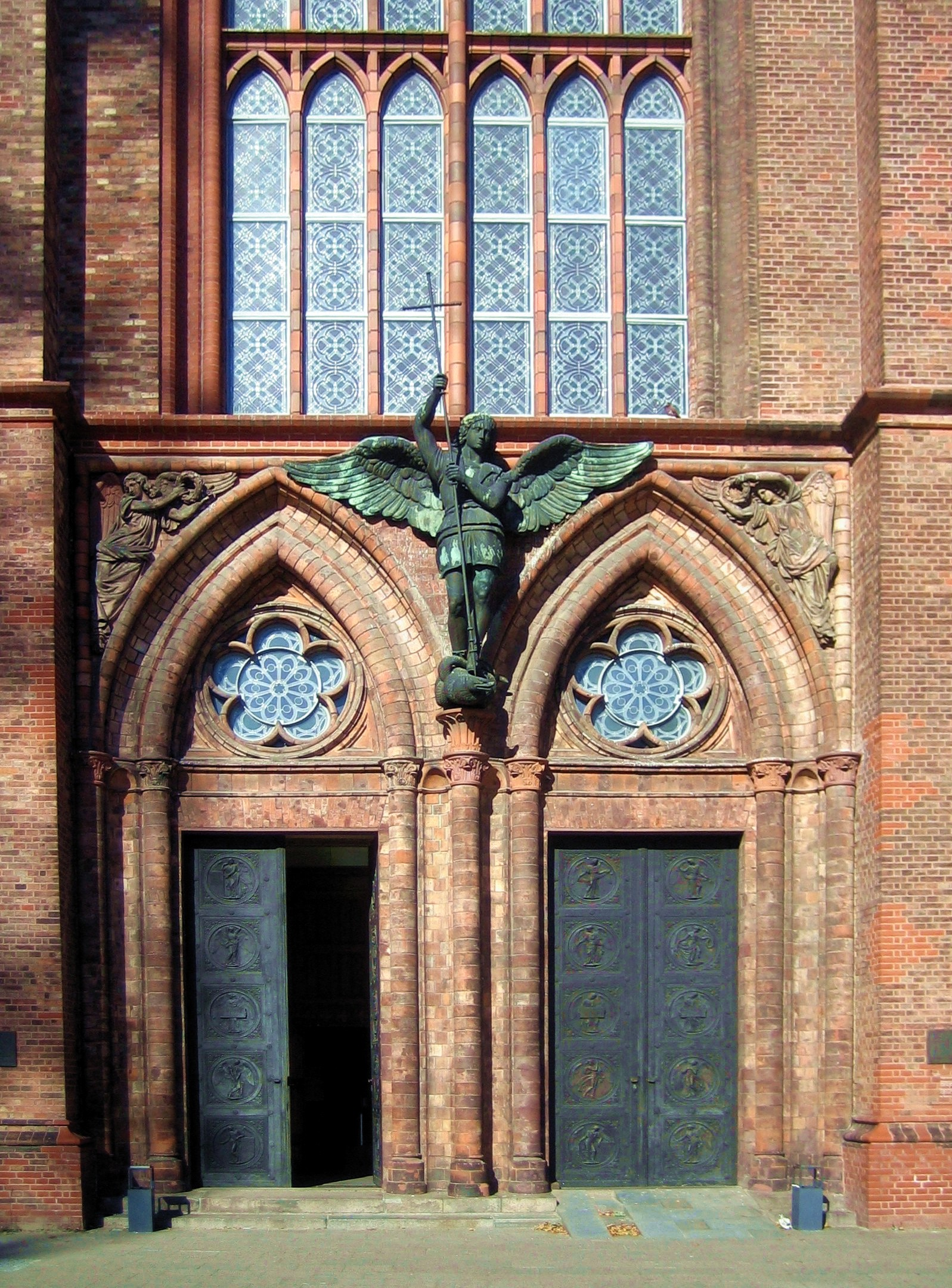 Die Friedrichswerdersche Kirche in Berlin-Mitte, erbaut von Karl Friedrich Schinkel. Der Haupteingang.